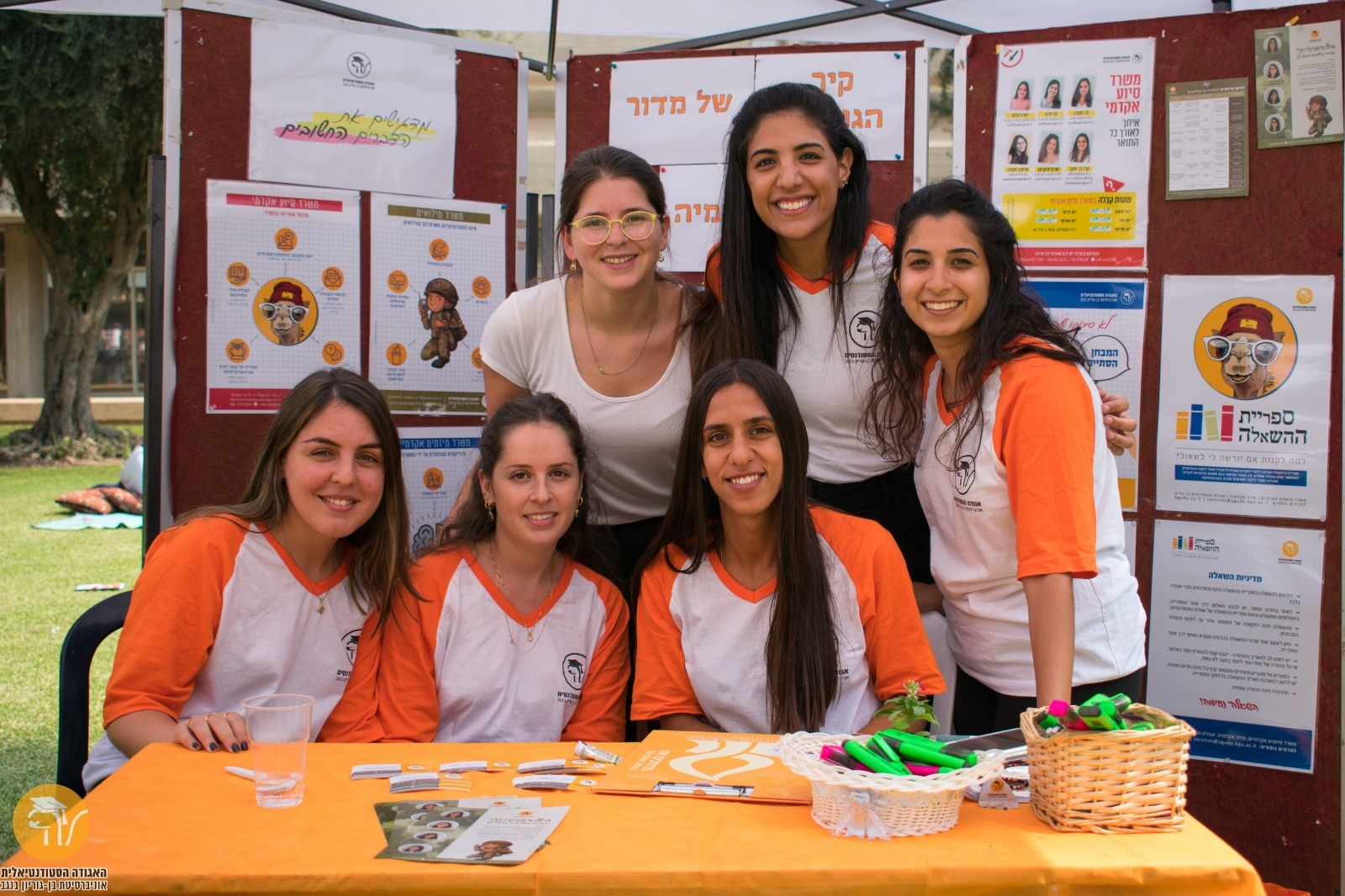 נציגות מדור אקדמיה בשבוע פתיחת שנה באוניברסיטת בן-גוריון